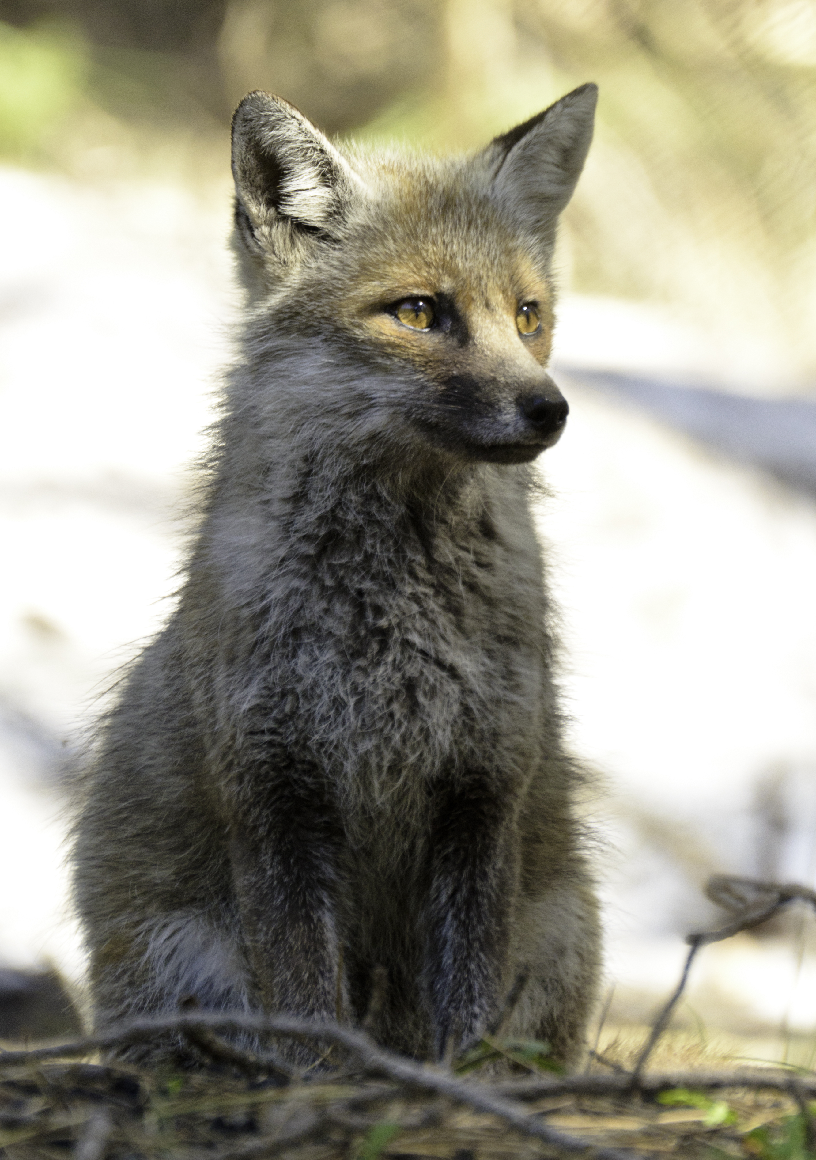 cucciolo di volpe rossa scattata all'interno della riserva naturale del parco dell'Etna vicino rifugio Sapienza, versante Sud